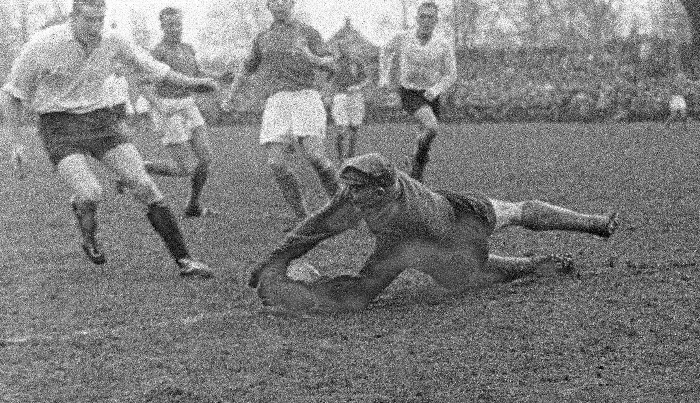 Collectie / Archief : Fotocollectie Anefo Reportage / Serie : [ onbekend ] Beschrijving : Voetbalwedstrijd Oud Internationals tegen HFC, Leo Halle in actie Datum : 1 januari 1960 Locatie : Haarlem Trefwoorden : sport, voetbal Persoonsnaam : Halle, Leo Fotograaf : Pot, Harry / Anefo Auteursrechthebbende : Nationaal Archief Materiaalsoort : Negatief (zwart/wit) Nummer archiefinventaris : bekijk toegang 2.24.01.05 Bestanddeelnummer : 910-9076